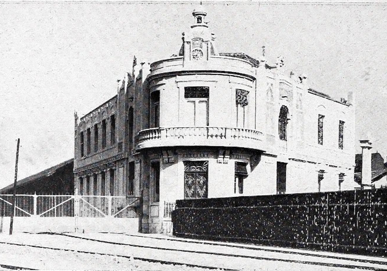 Vista exterior de los edificios, muelles y estación de la Alhóndiga.